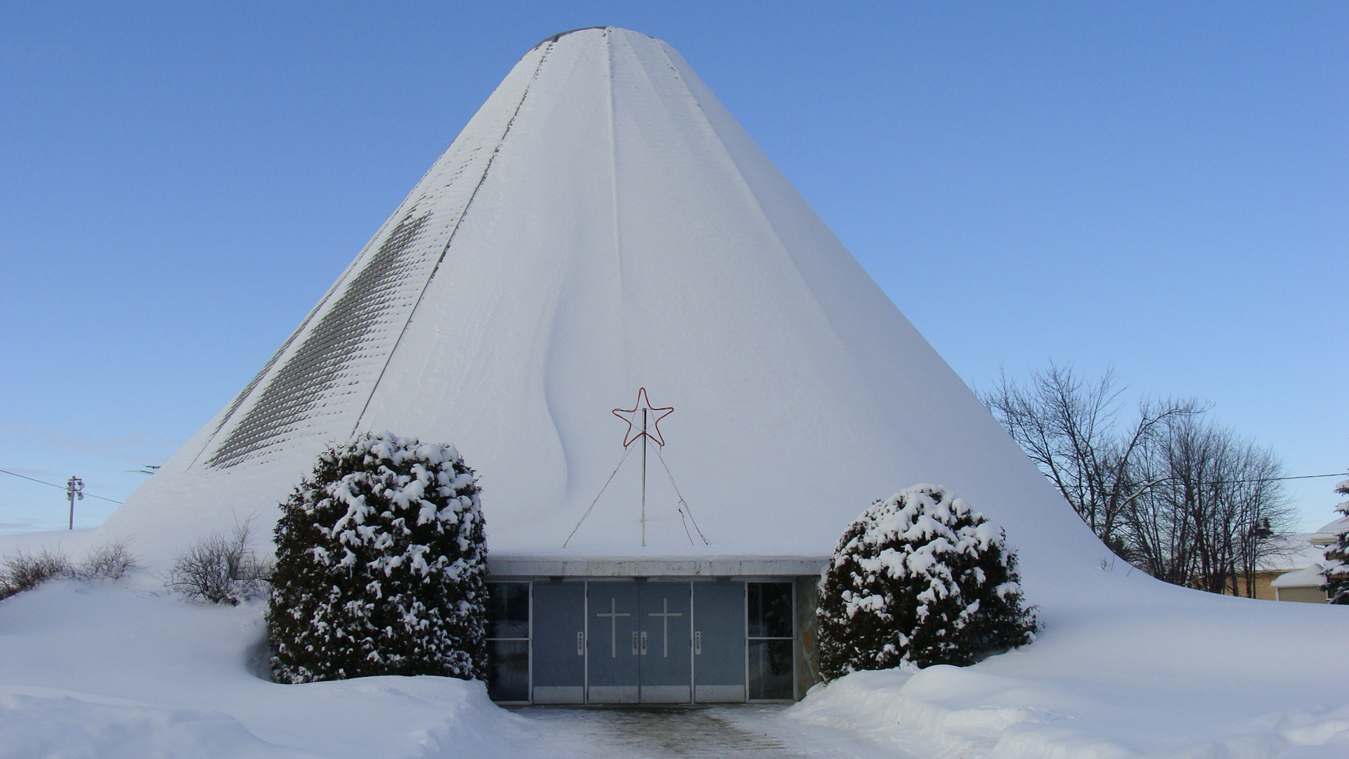 Église de la municipalité de Saint-David-de-Falardeau, au Québec (Canada)